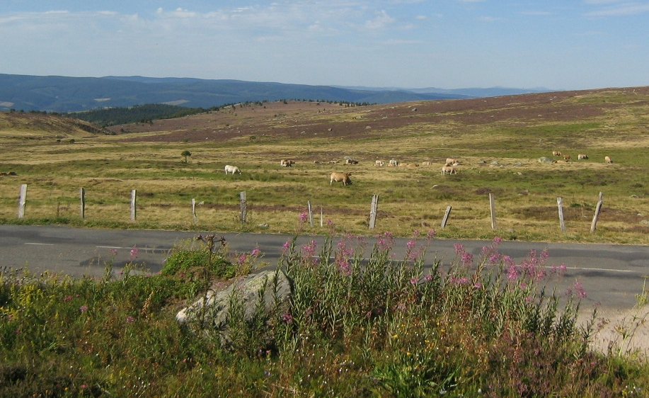 Panorama vers le nord-est depuis le col de Finiels (1 541 m) en Lozère.